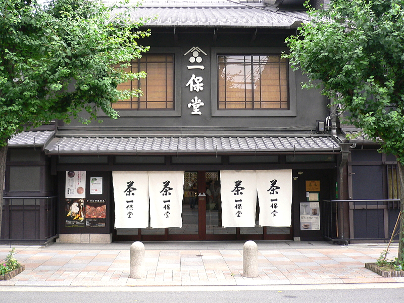 Ippodo Web site一保堂茶舗 / Ippodo Tea Co.